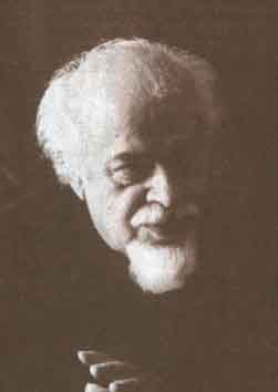 منبع